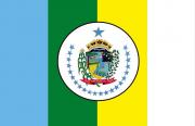 Drapeau de la municipalité d'Abelardo Luz - SC - Brésil